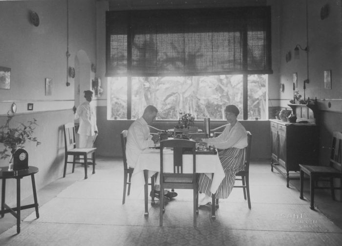 Foto. Pasangan Eropa sedang bersantai di ruang makan rumah mereka, seorang pelayan berdiri di latar belakang